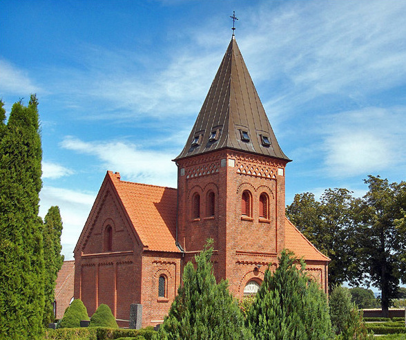 fra nordvest